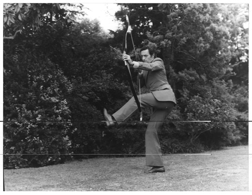 Tristán con arco y flecha, en la película La guerra de los sostenes (1976).